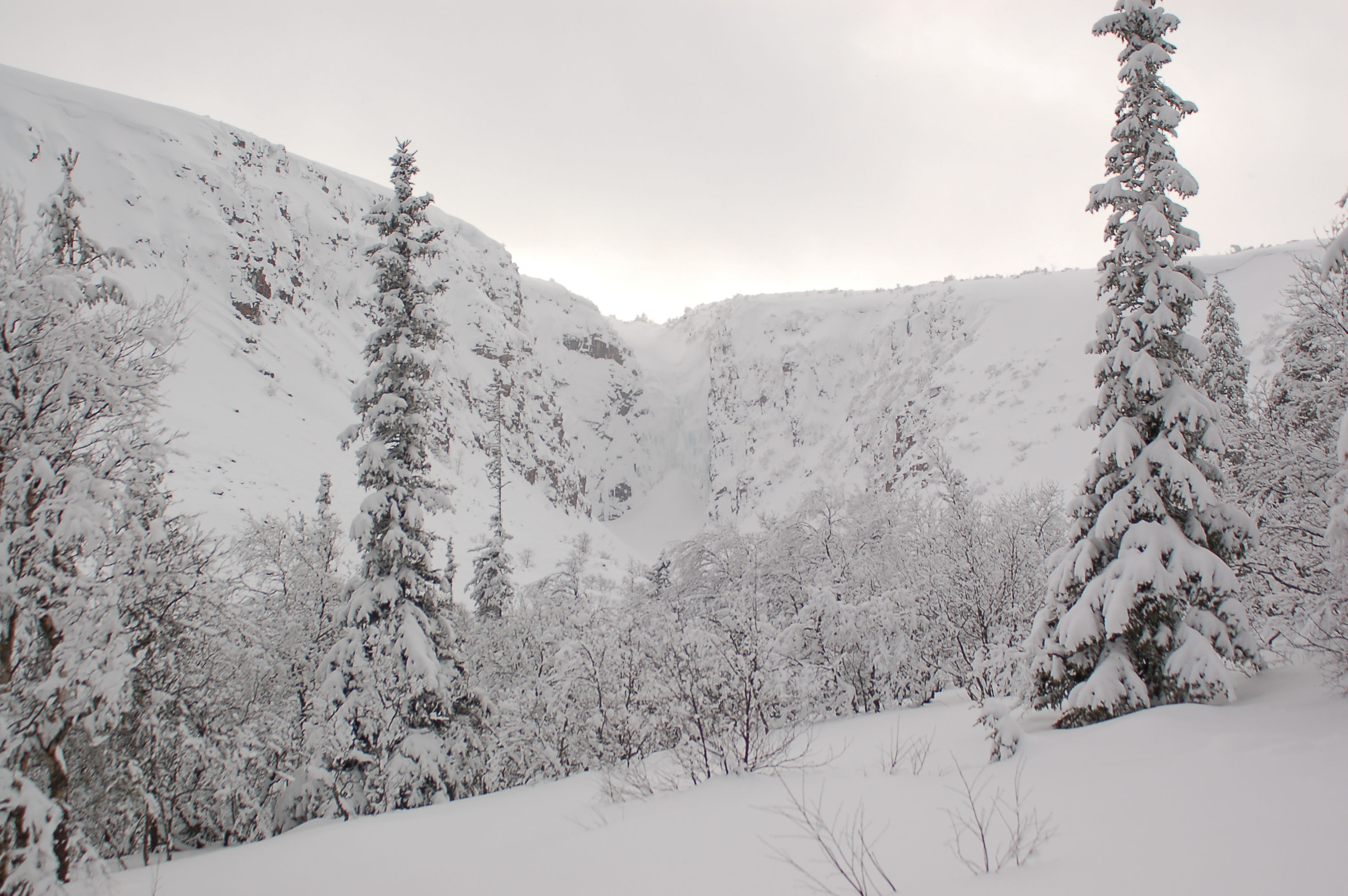 Winter at Fujufjallet National Park in Western Sweden.